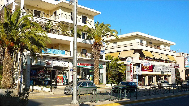 Pallini